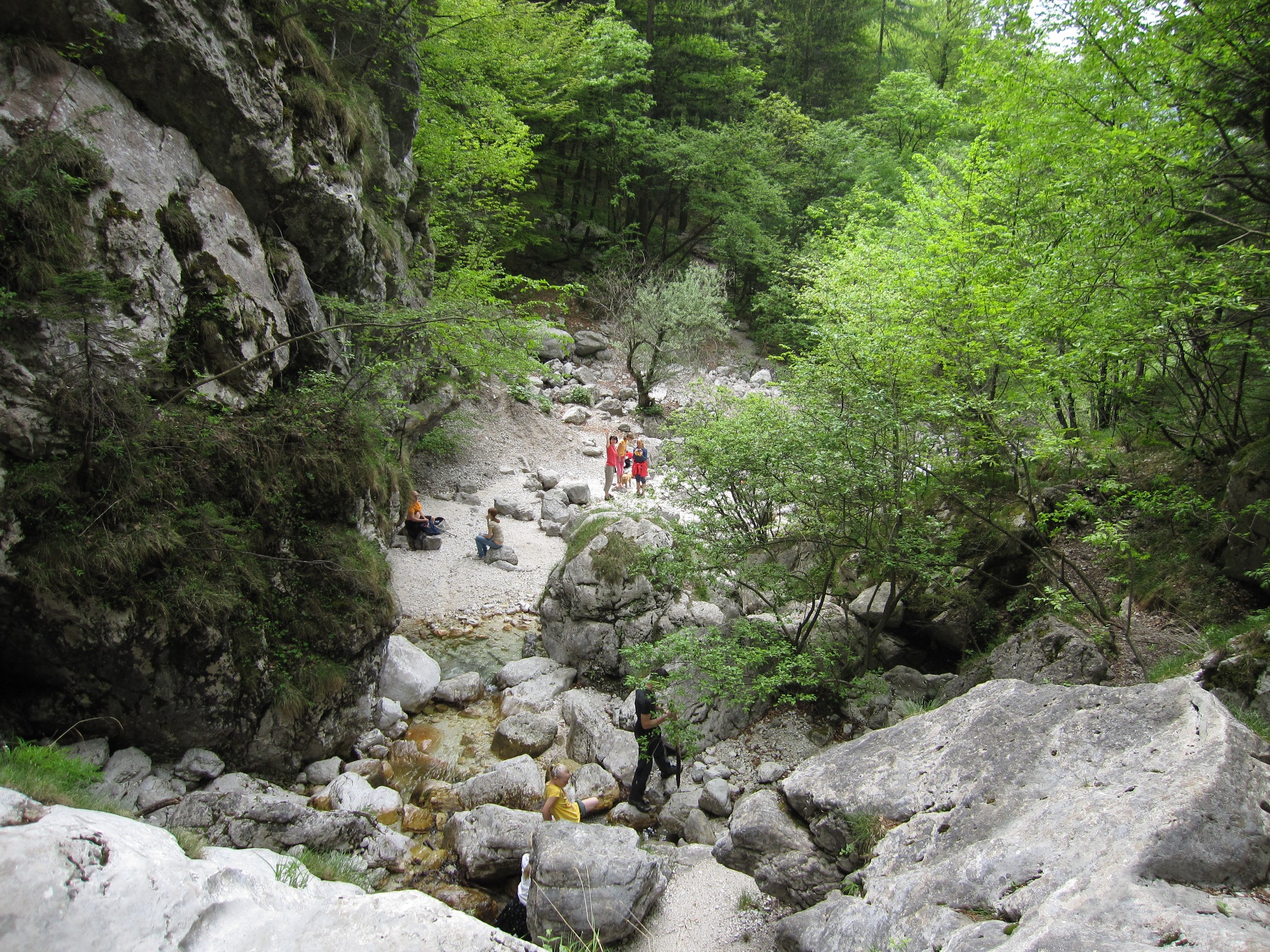 Prodišče pod slapom Orglice je poleti priljubljena izletniška točka.